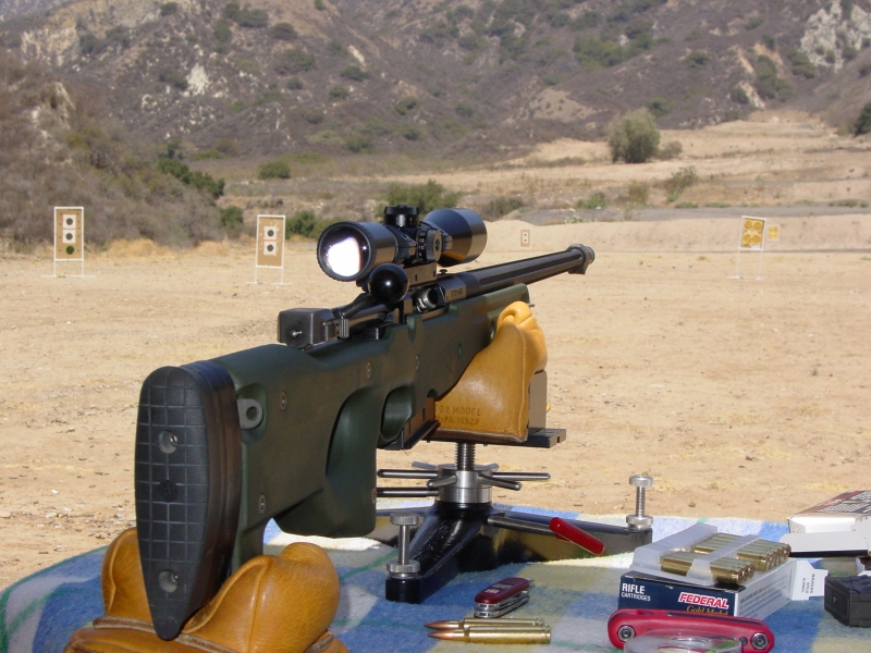 Eine "Arctic Warfare Police Model".